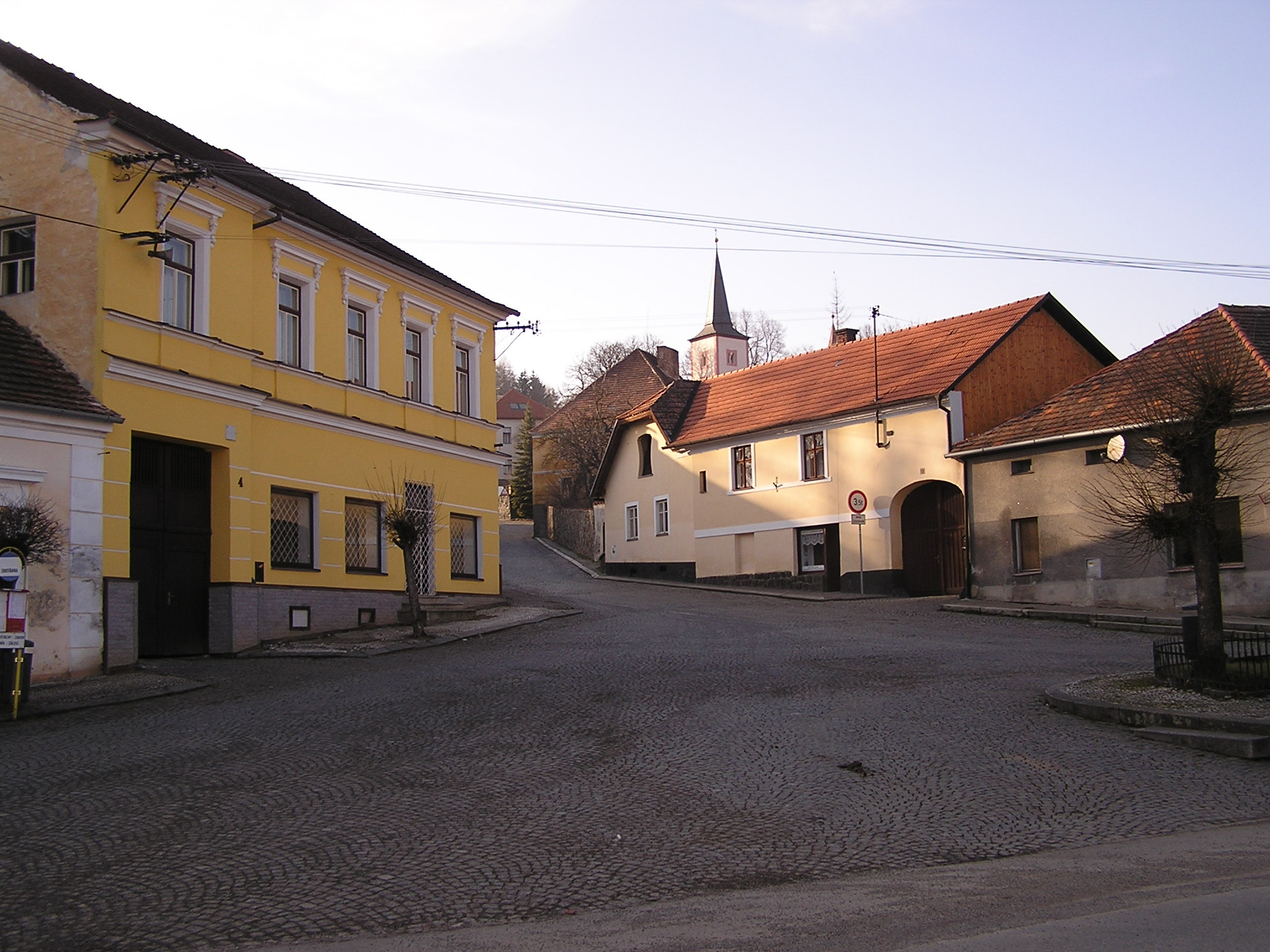 Čestice, náměstí